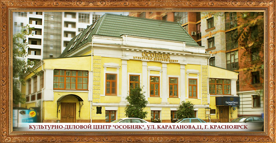 Восстановлен и открыт в 2006 г. Красноярск